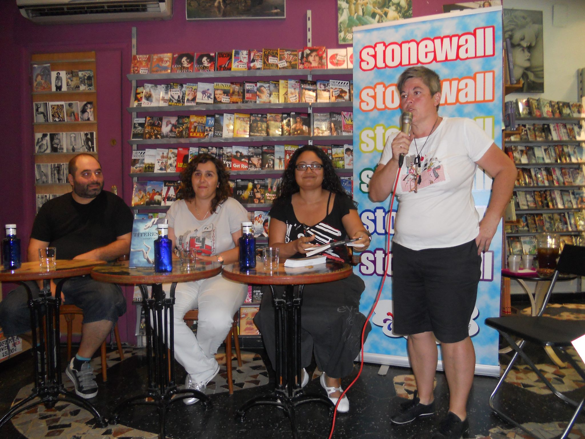 Presentación de la novela Títeres (ed. Stonewall), de Mónica Martín, en la librería Berkana.